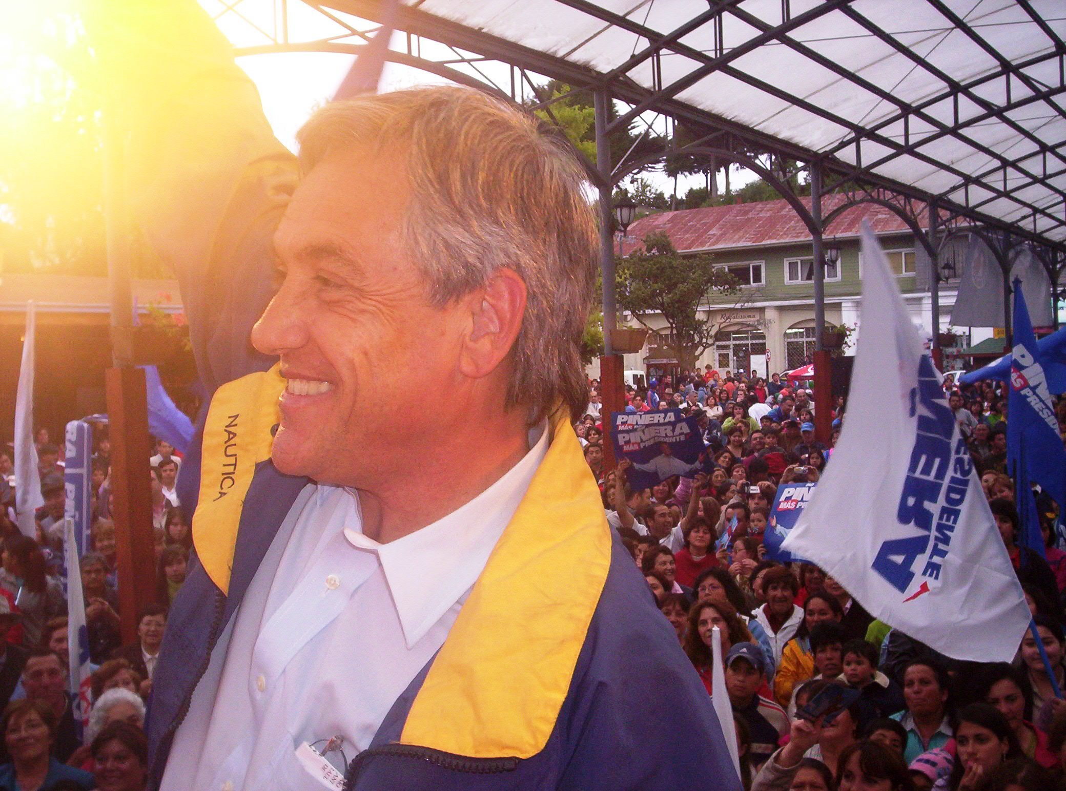 Sebastián Piñera en Puerto Varas, Chile, durante su campaña presidencial en 2006.